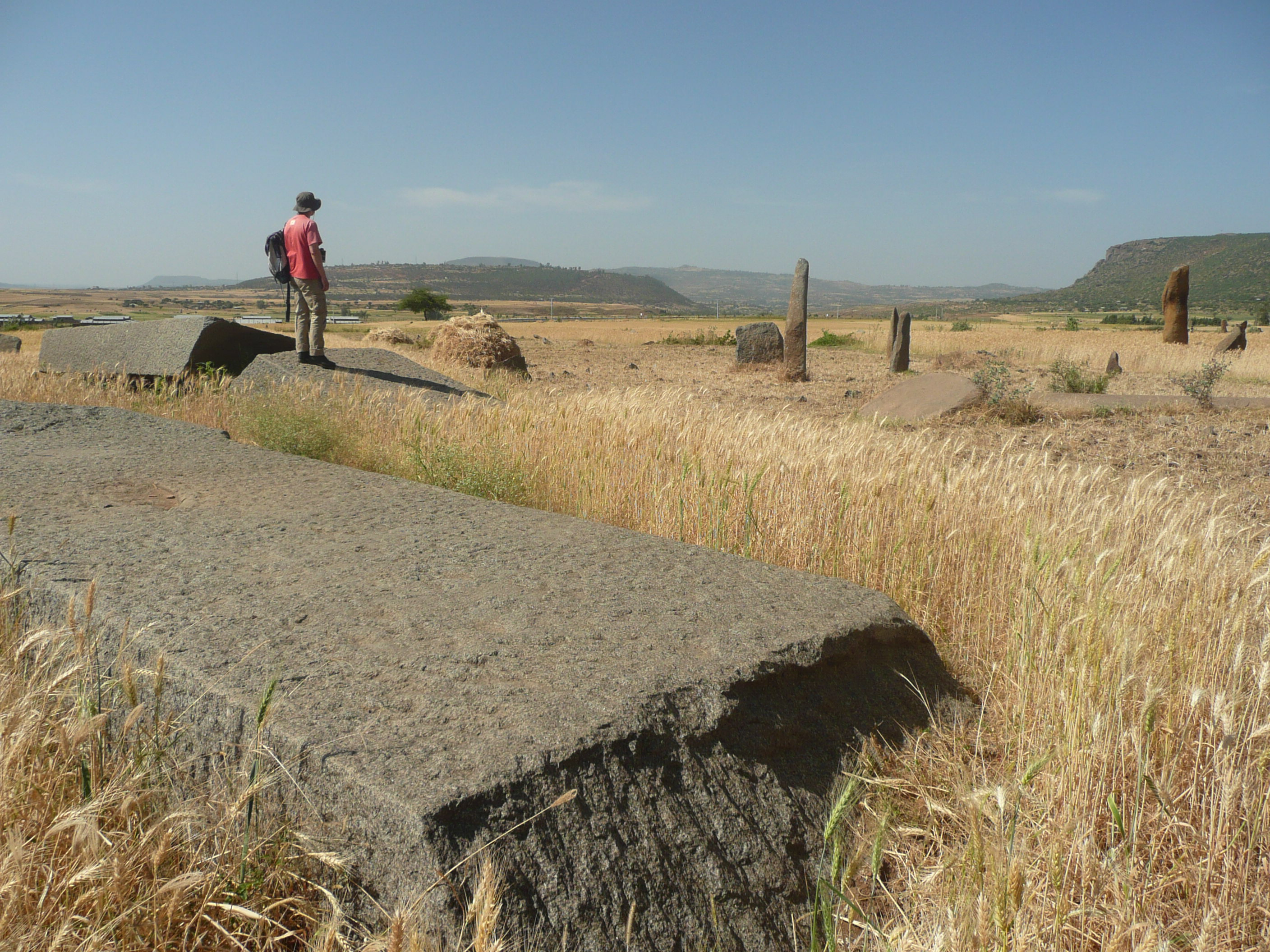 Vista parcial del campo de estelas de Gudit, periodo aksumita, Aksum